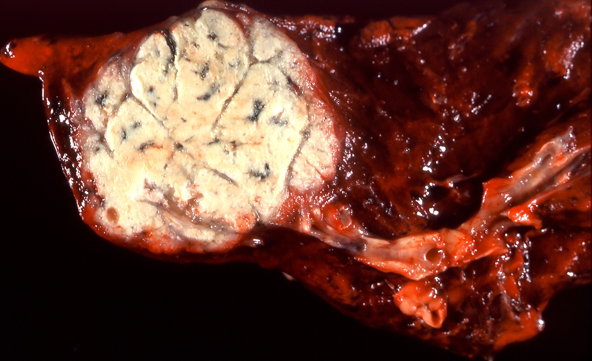 Metastatic colonic adenocarcinoma